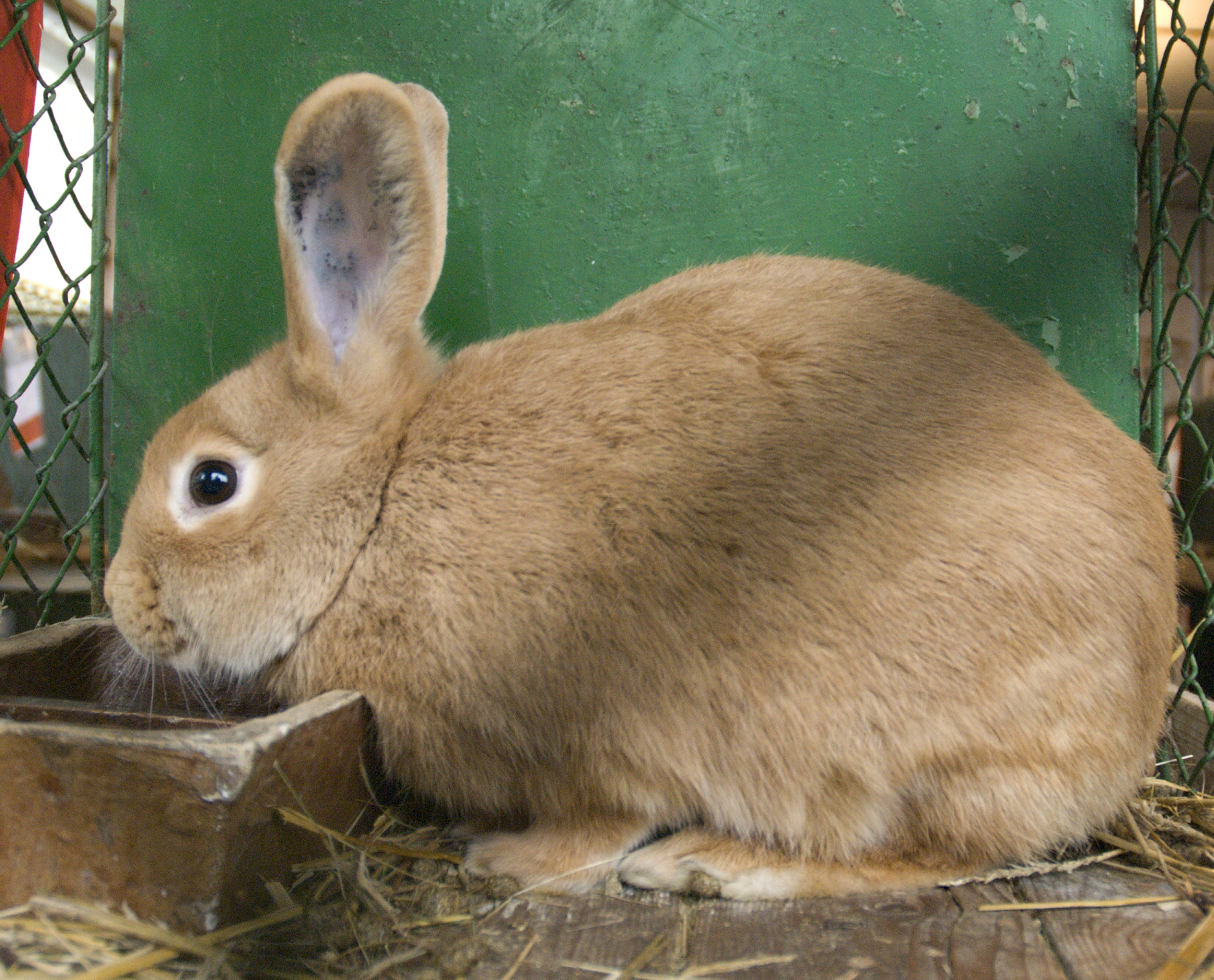 burgundský králík